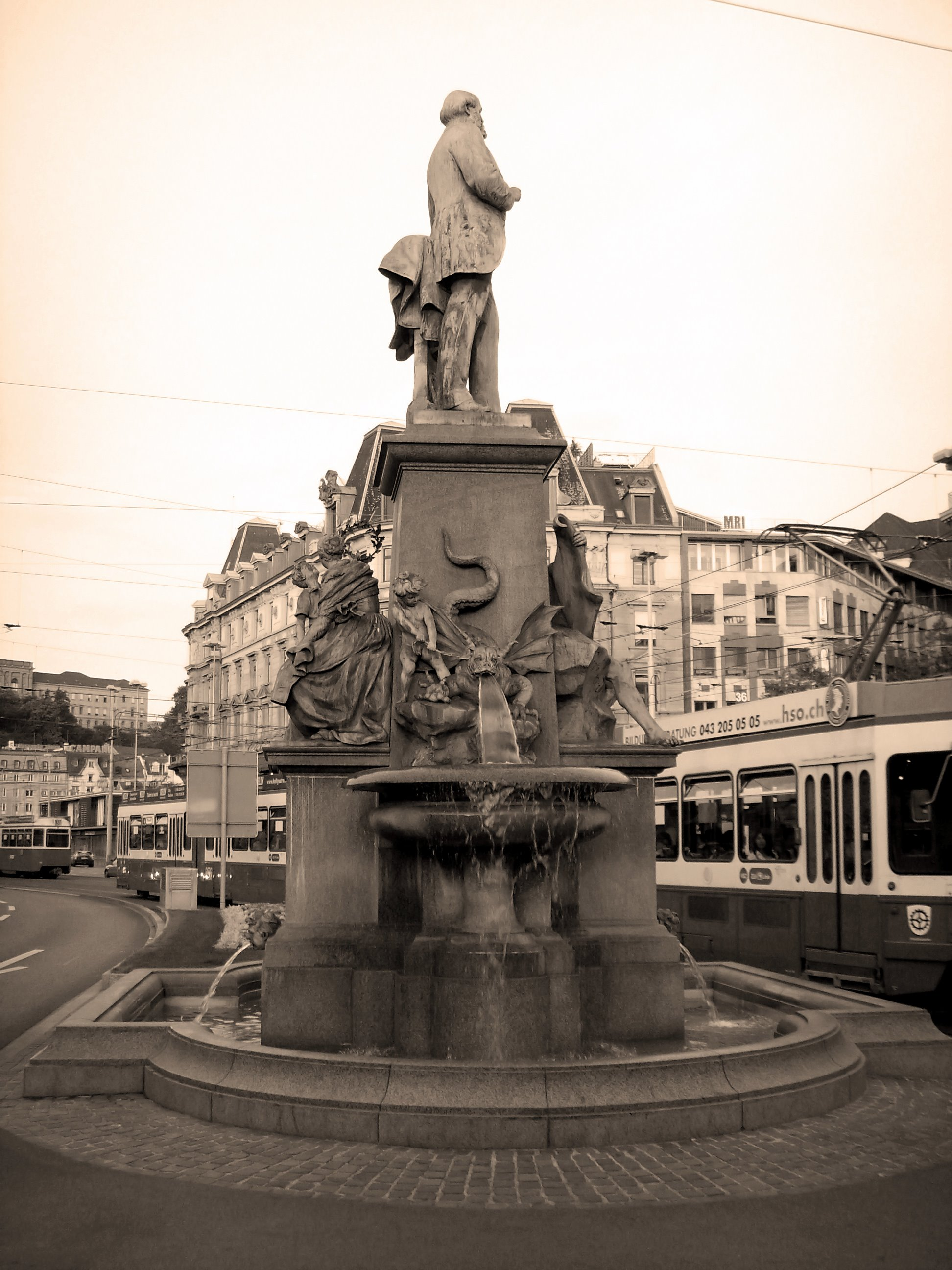 ein zürcher brunnen neben dem hbSSL10718